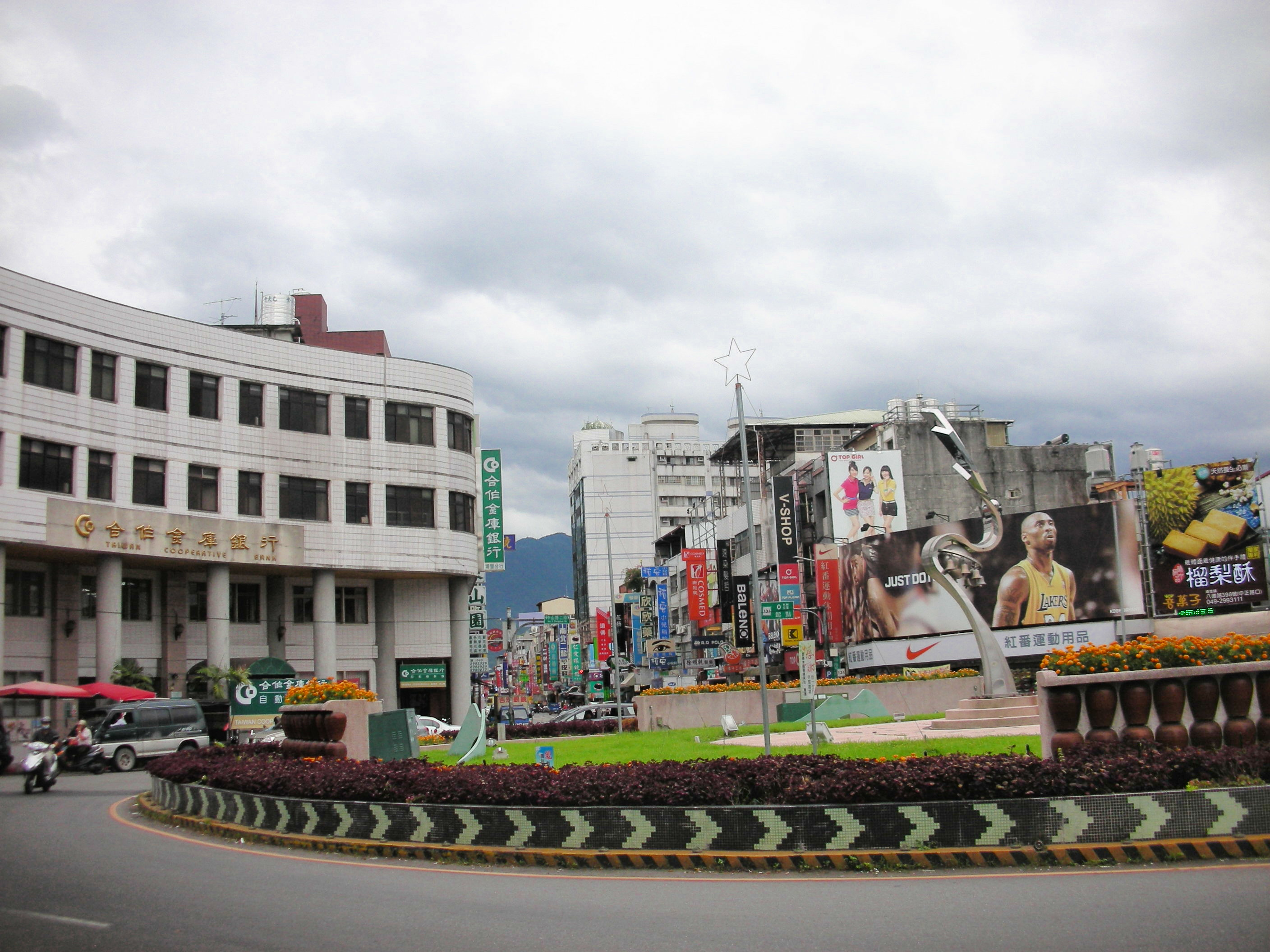 南投縣埔里鎮，合作金庫銀行埔里分行與中正路圓環。